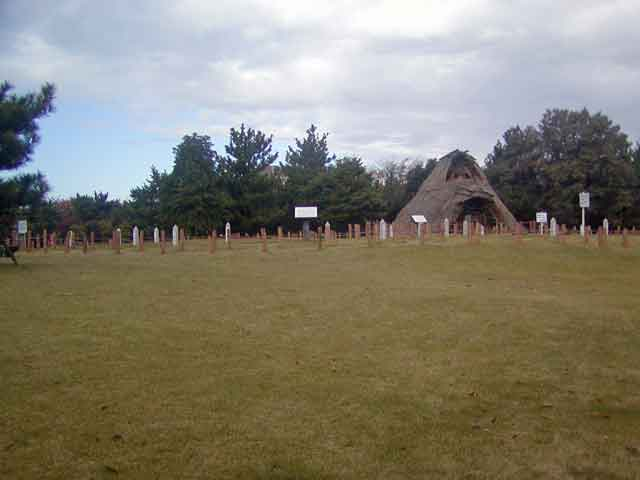 御経塚遺跡 Okyozuka Site, Nonoichi, Ishikawa, Japan 投稿者が撮影